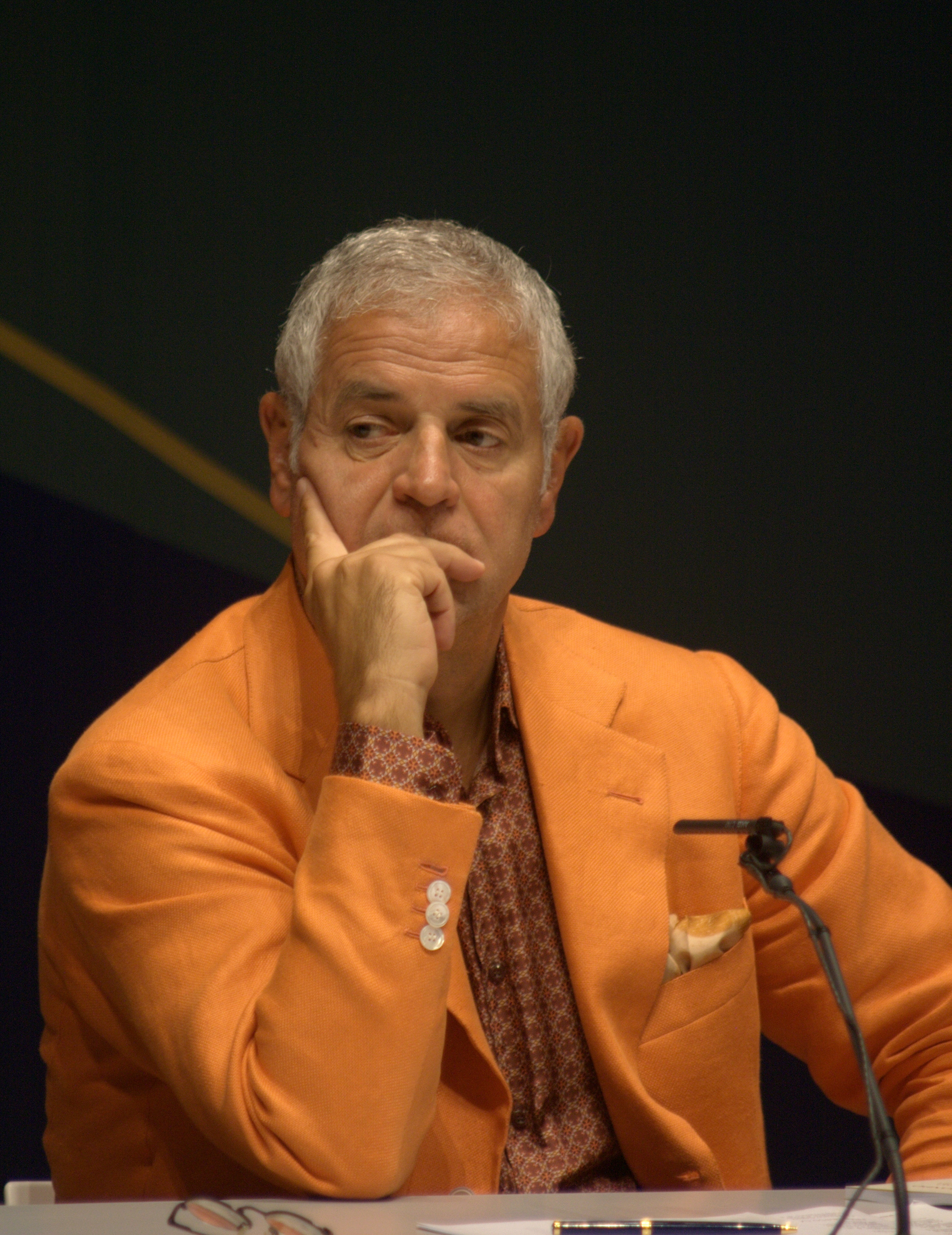 Roberto Formigoni agli Stati Generali Expo 2015.